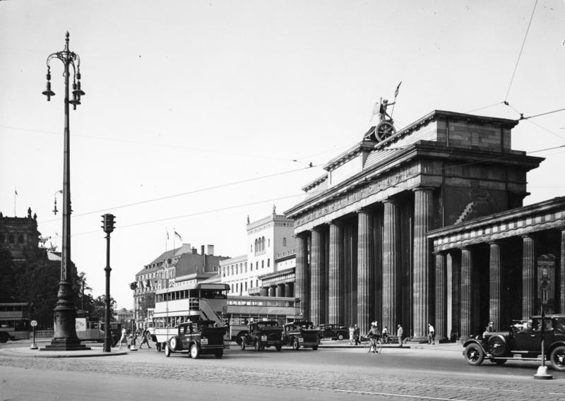 Berlin, Brandenburger Tor